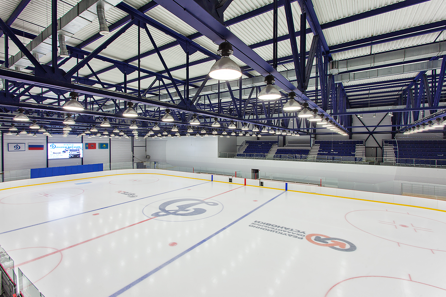 Ледовый Дворц Спорта «Динамо» в Барнауле